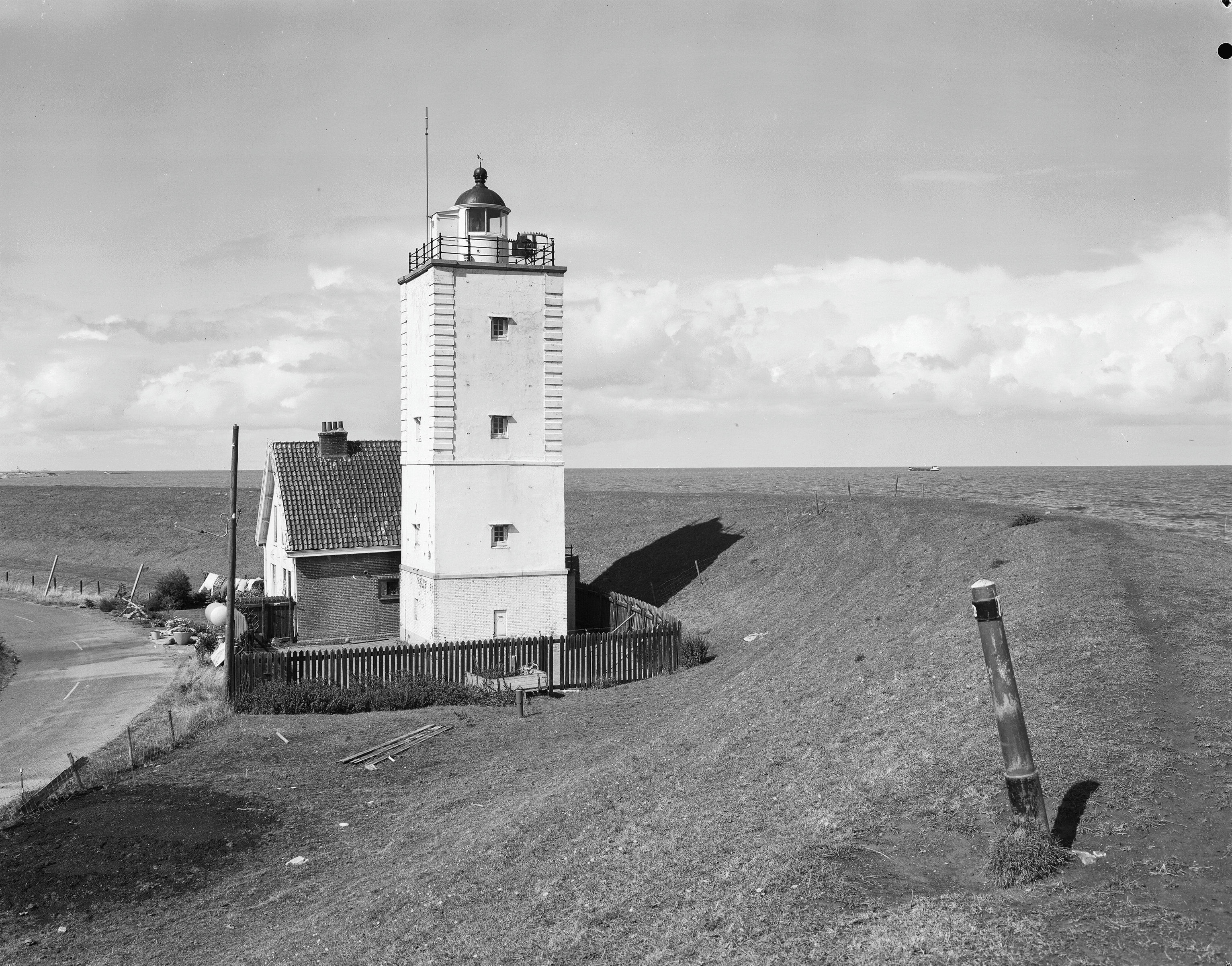 Vuurtoren "De Ven": overzicht